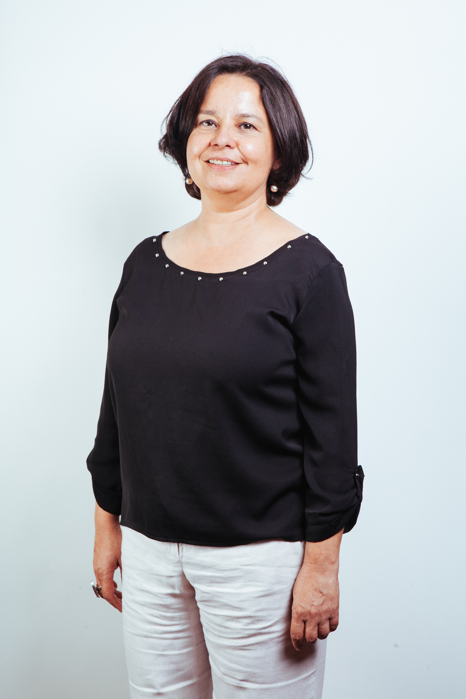 Ministro de Estado del segundo gobierno de Michelle Bachelet (2014-2018)